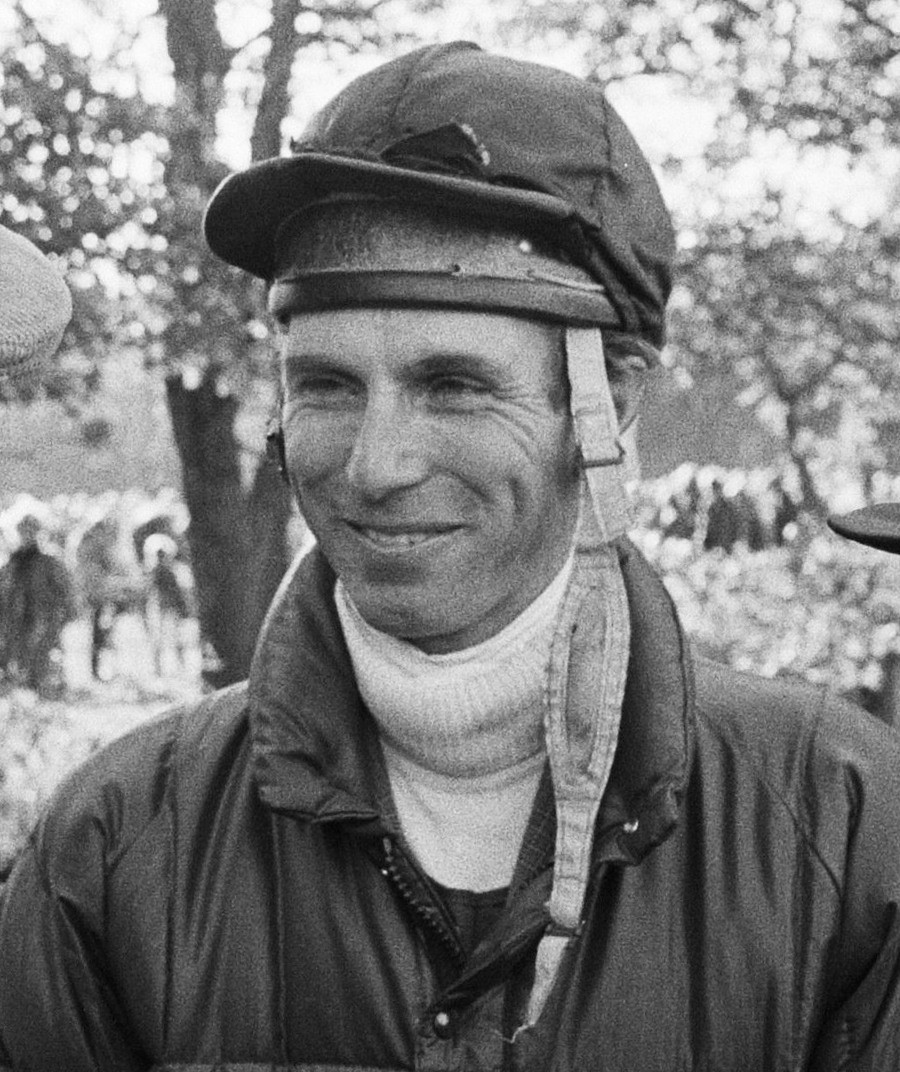 Internationale Military te Boekelo, Prins Bernhard, Prinses Anne en Mark Philips in gesprek